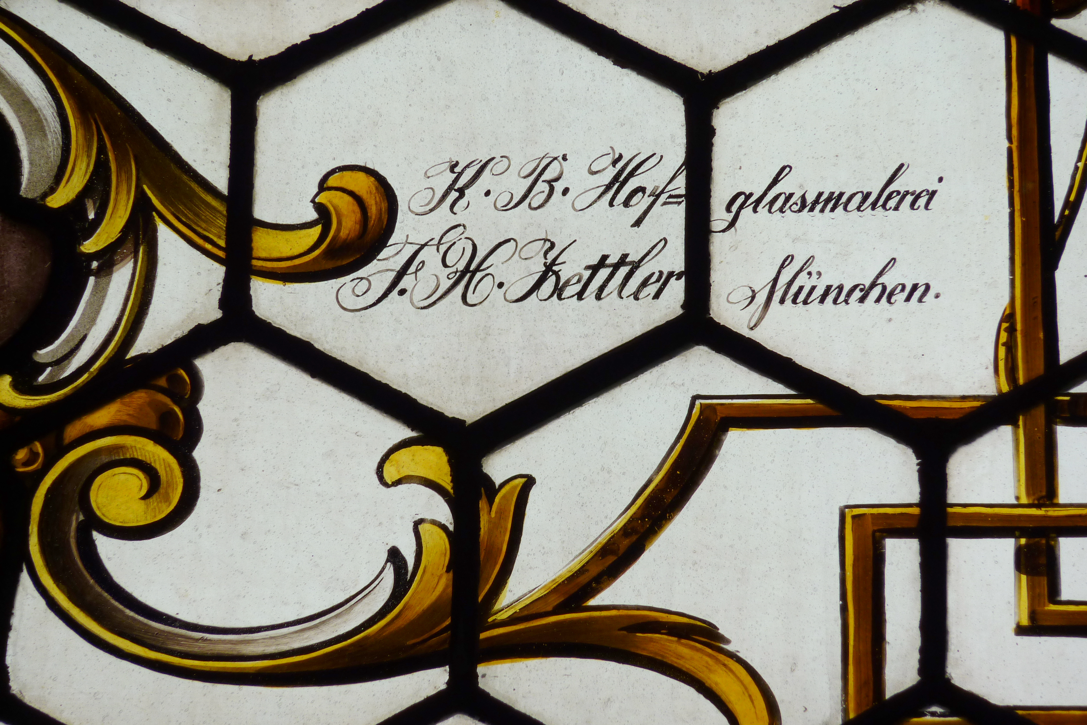 Katholische Pfarrkirche St. Nikolaus in Oberndorf am Lech, einer Gemeinde im Landkreis Donau-Ries (Bayern),Bleiglasfenster von der Königlich Bayerischen Hofglasmalerei Franz Xaver Zettler (1902 ?); Ausschnitt aus dem Fenster des hl. Josef; Signatur rechts unten: K.B. Hof=glasmalerei F.X. Zettler München